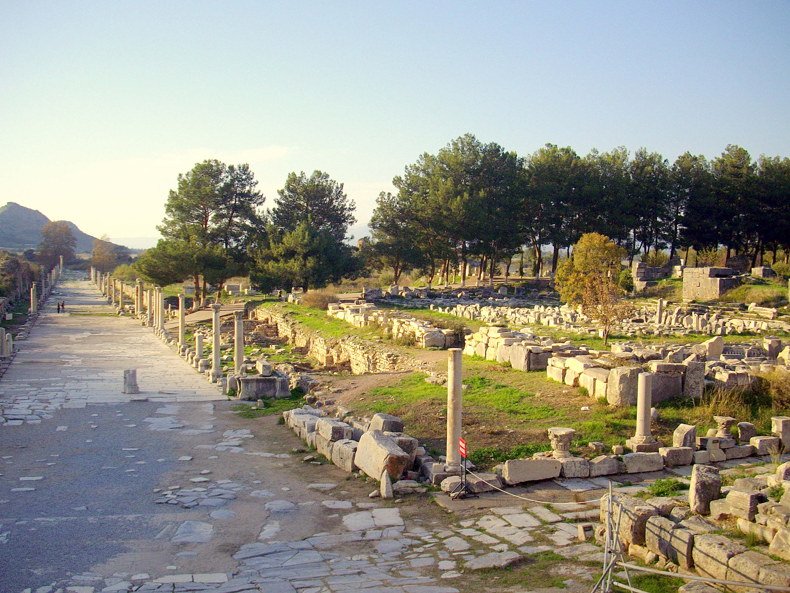 Arcadian avenue, アルカディア通り